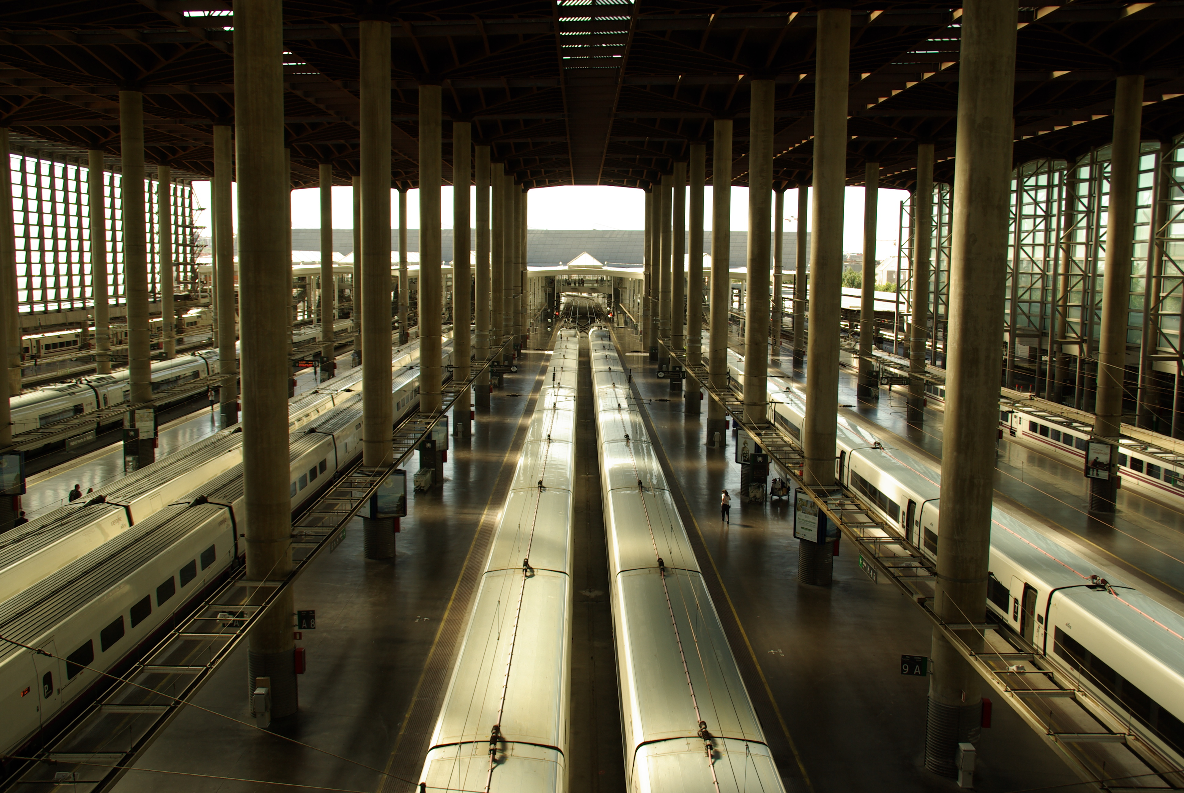 ® S.D. MADRID A.F.U. ESTACIÓN PUERTA DE ATOCHA - ZONA A.V.E.